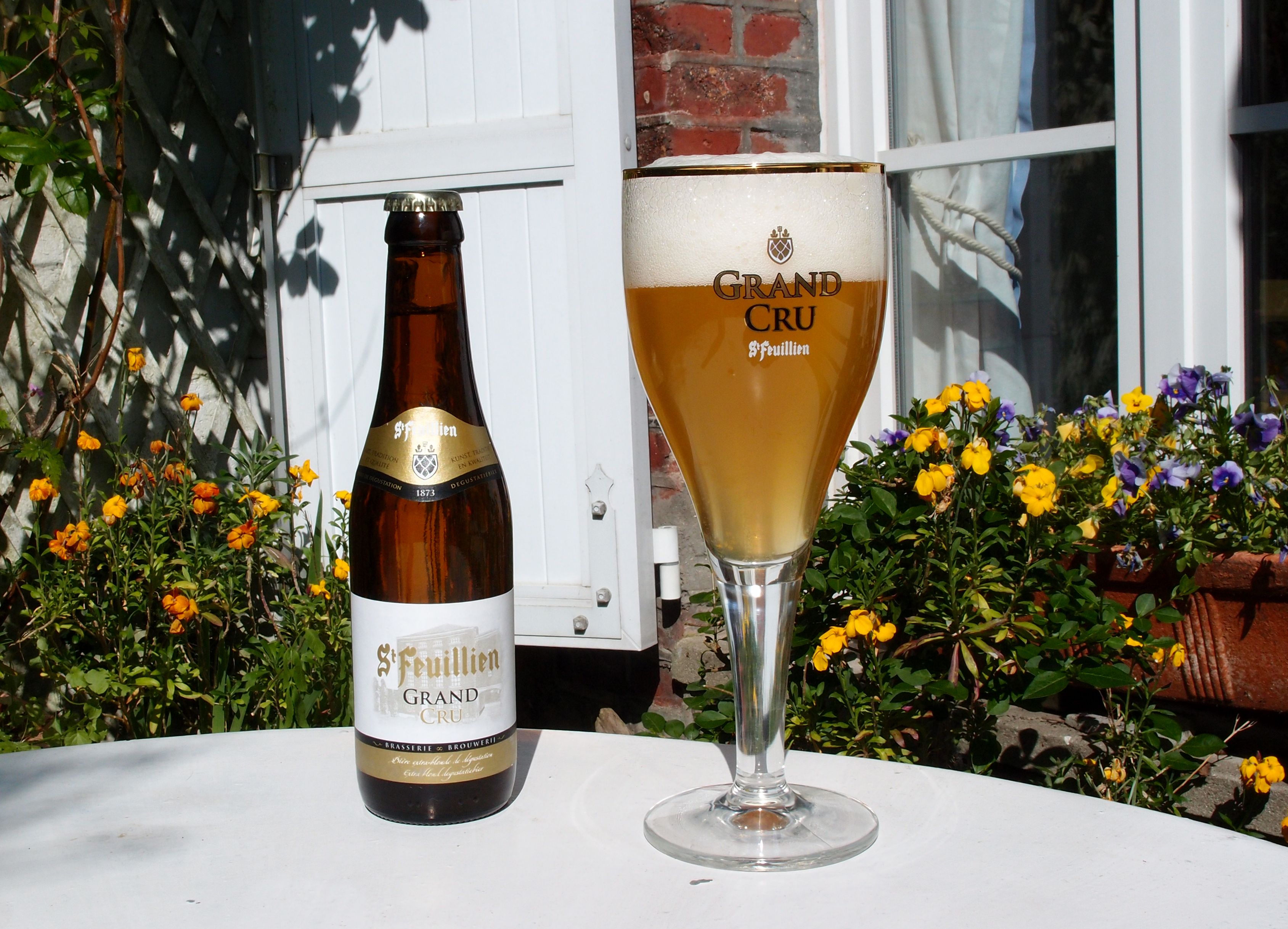 St-Feuillien Grand Cru im Originalglas (Belgische Biermarke) Datum: 13.05.2012 Urheber: M. Pfeiffer alias Benutzer:Gordito1869 Quelle: privates Fotoarchiv des Urhebers